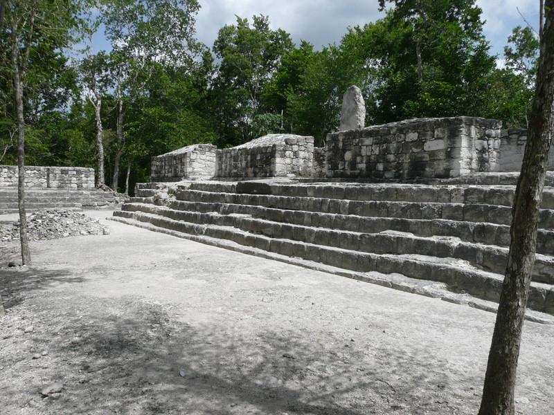 Zona arqueológica de Calakmul.